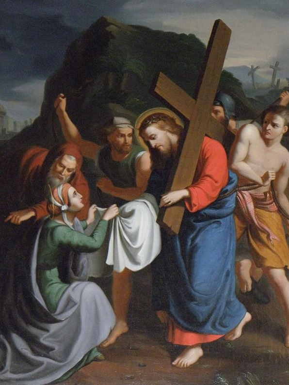 Chemin de croix de l'église de Saint-Brice-en-Coglès (35). Station VI : Véronique essuie la face de Jésus.